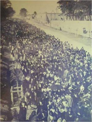 Marcha unionista del 11 de marzo de 1920, que inició la caída de Manuel Estrada Cabrera